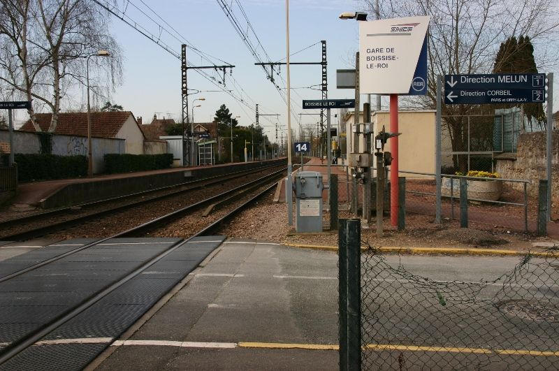 Gare de Boissise-le-Roi.